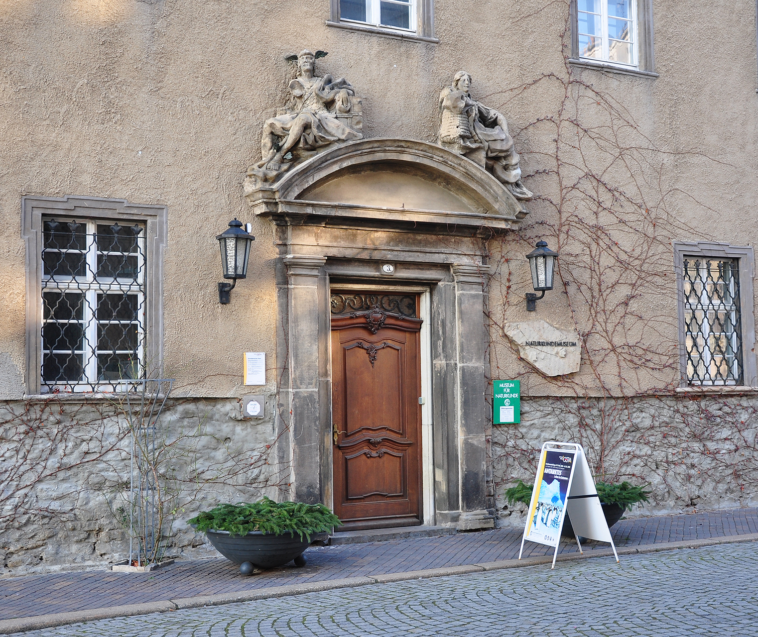 Gera - Eingang zum Naturkundemuseum im Schreiberschen Haus